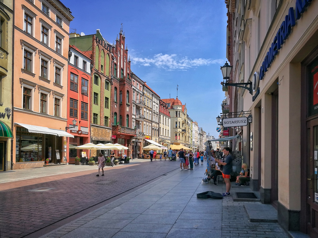 Ulica Szeroka w Toruniu8